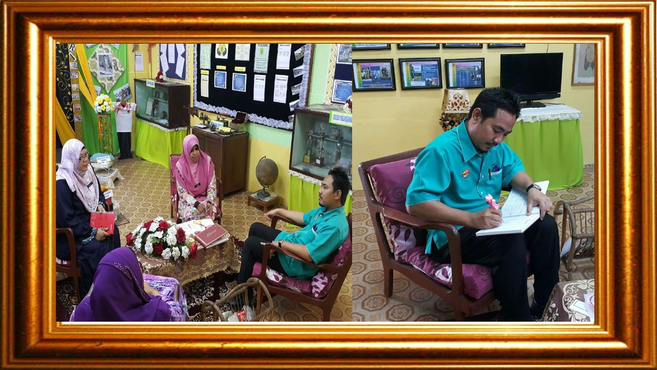 khidmat bantu